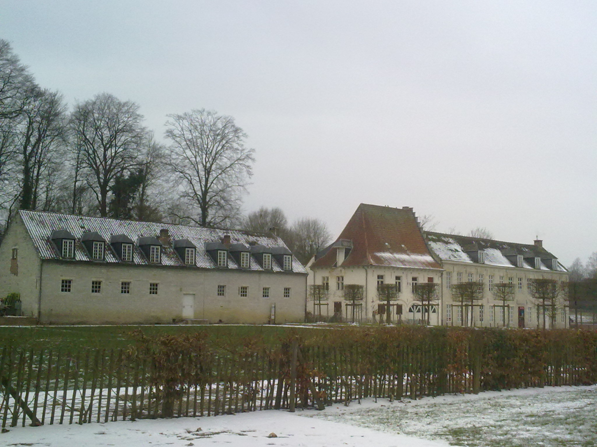 Site de l'Abbaye du Rouge-Cloître à Auderghem (Bruxelles).